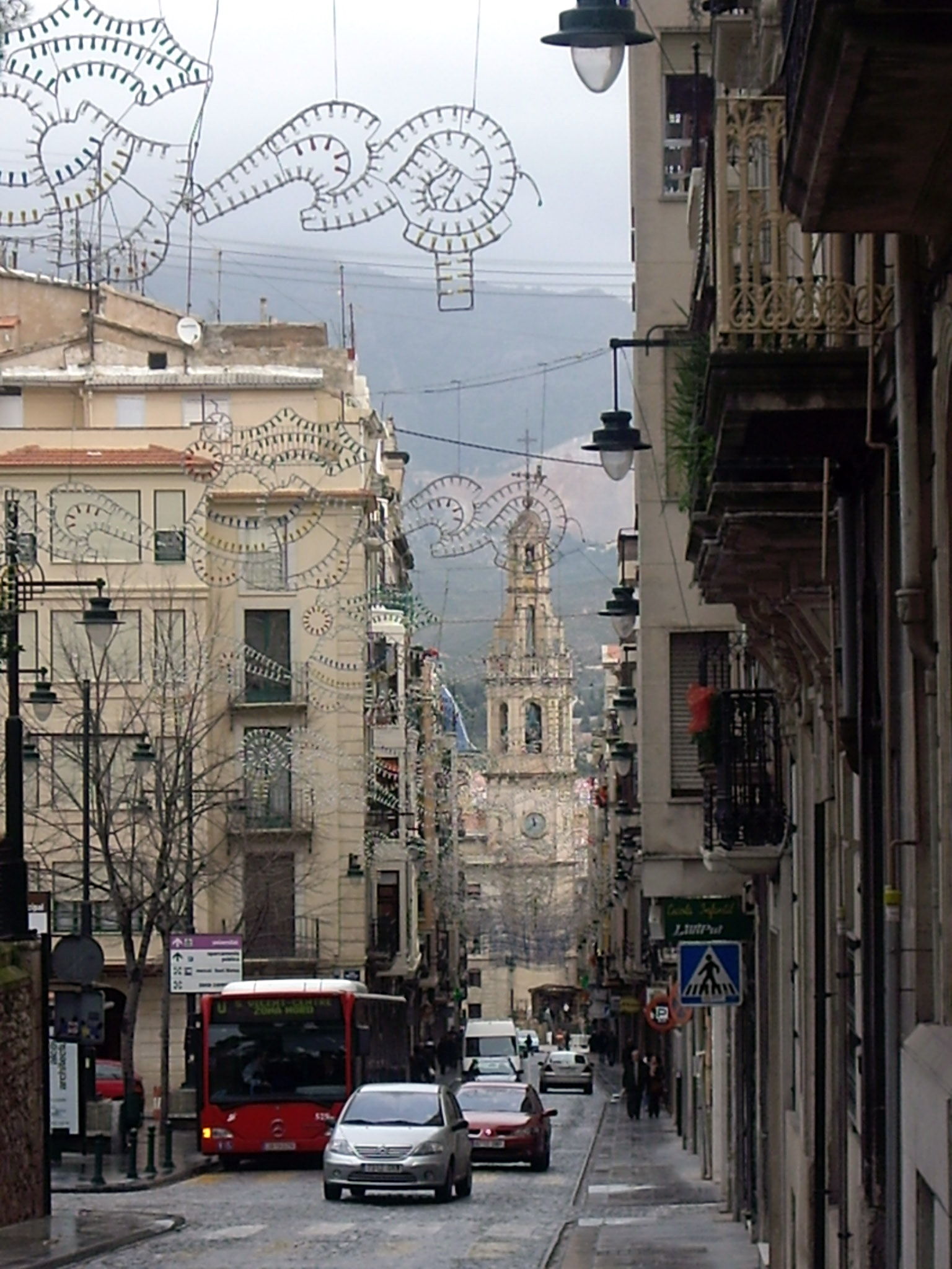 Vista del campanar de Santa Maria des del carrer Sant Nicolau amb l'enramada de festes de Nadal